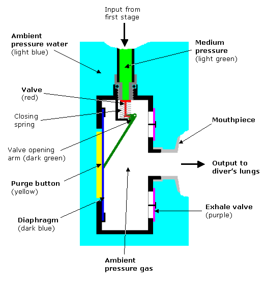 Immagine tratta da wikipedia inglese.